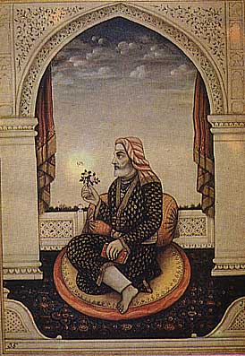 Sawan Mal